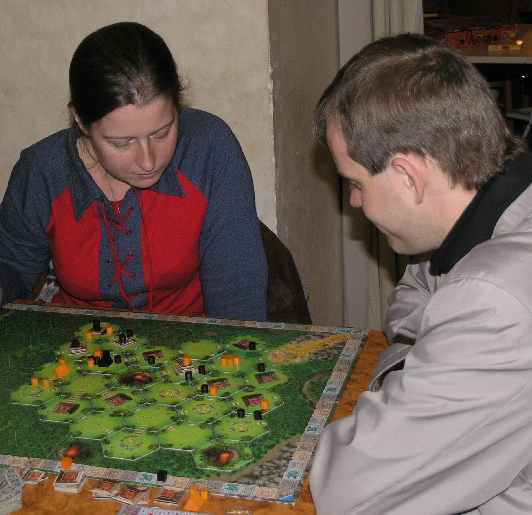 Herní festival Deskohraní 2008 - Tikal